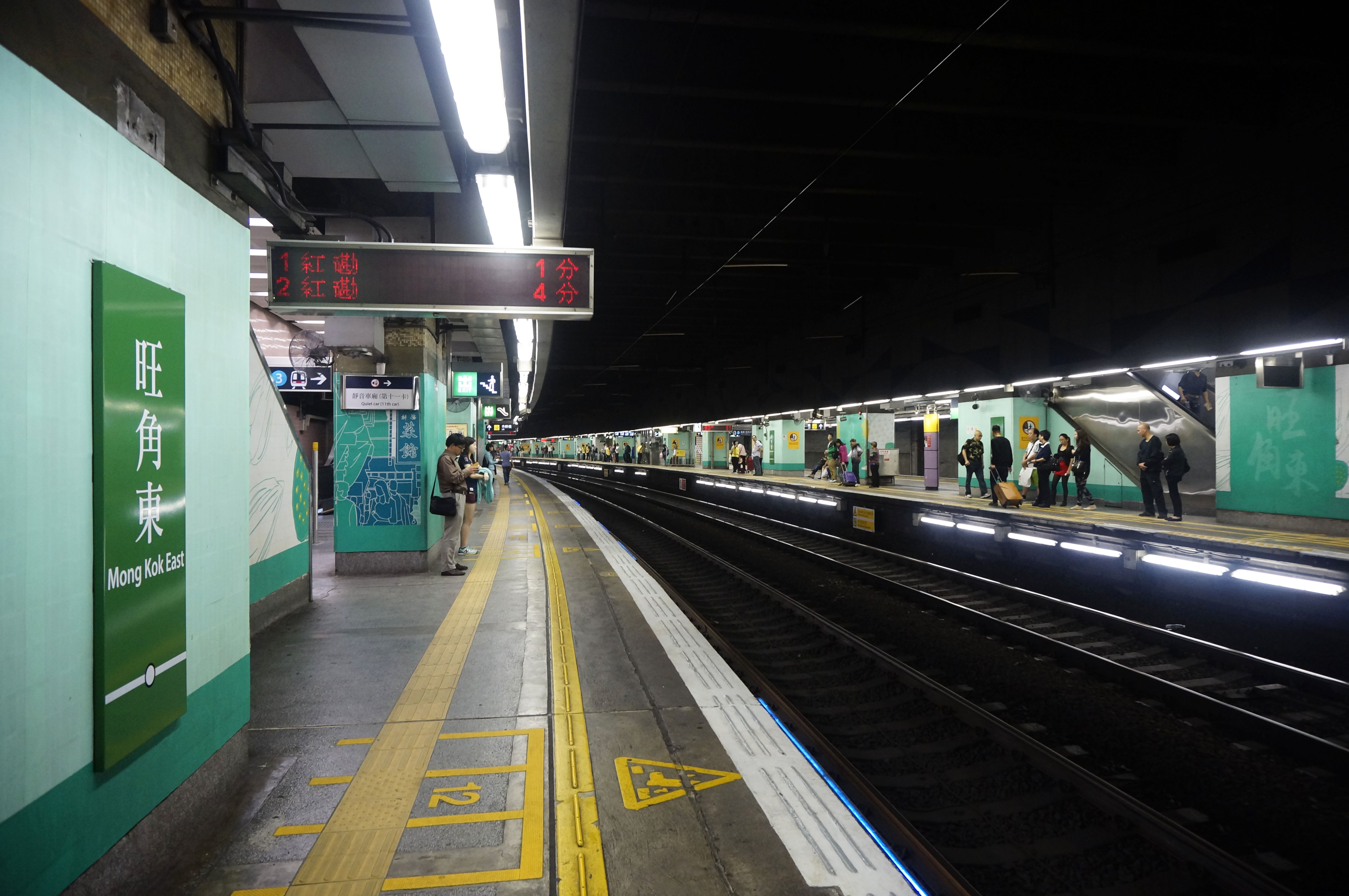 港鐵旺角東站月台